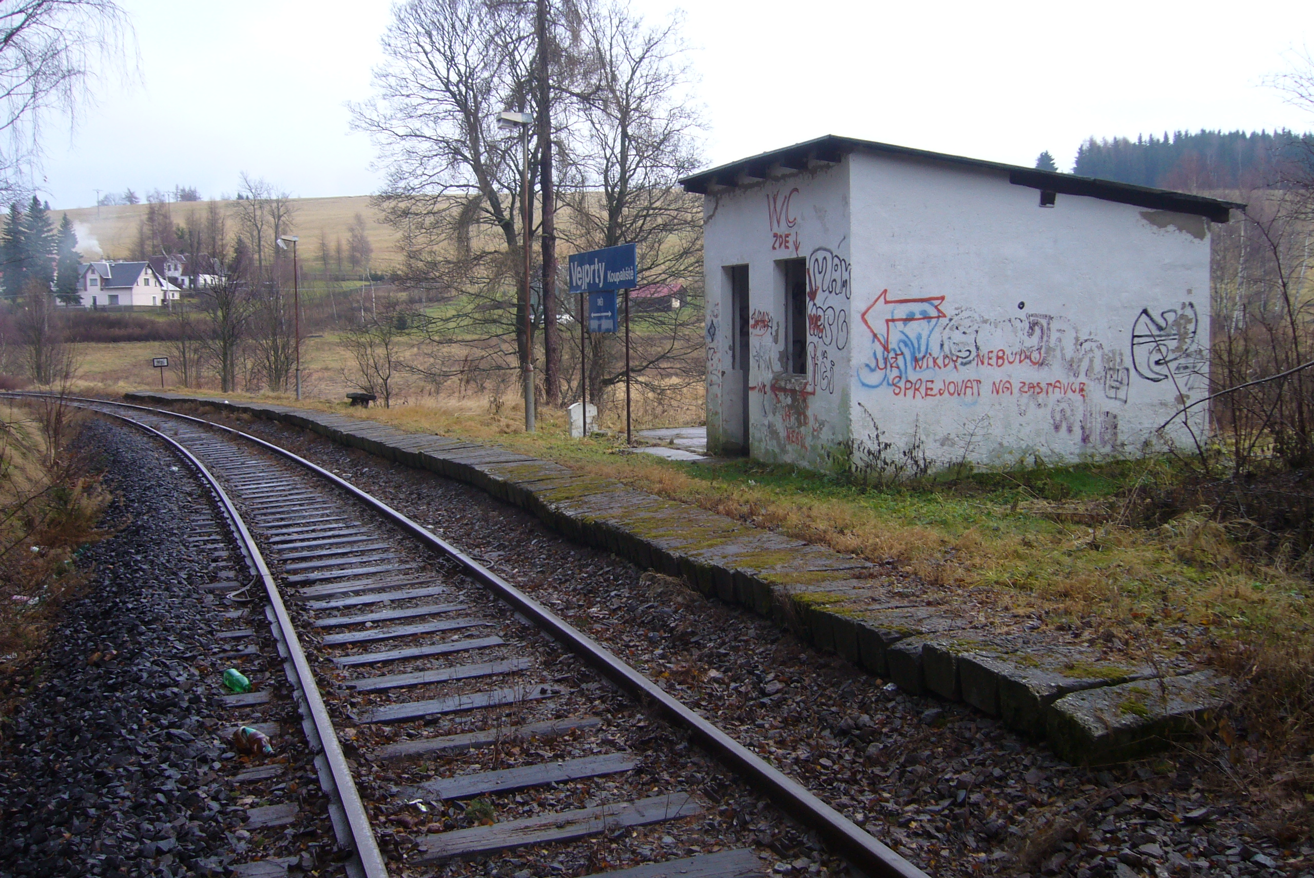 Vejprty – železniční zastávka Vejprty koupaliště v roce